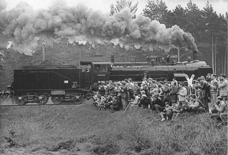 Tangesdorf, Dampflok (BR 38), Fotohalt Zum Beitrag: Viel Herz für's Stahlroß - Unterwegs mit der Eisenbahn von anno dunnemals ADN-ZB Uhlemann - 17.6.1986 bb. Sonderfahrt eines Eisenbahn-Traditionszuges von Oranienburg nach Templin und zurück. Bei einem Foto-Halt in Tangersdorf stieß die Dampflokomotive Baureihe 38 mehrmals zurück und kam, dicke Dampfwolken ausstooßend, wieder eindrucksvoll angedampft, damit die vorher ausgestiegenen Passagiere - überwiegend Mitglieder von Berliner Arbeitsgemeinschaften des Deutschen Modelleisenbahnverbandes - sie möglichst günstig ins Bild bekommen und auf den Film bannen konnten. (Hierzu gehören die Fotos 1986-0617-300N - 307N!)